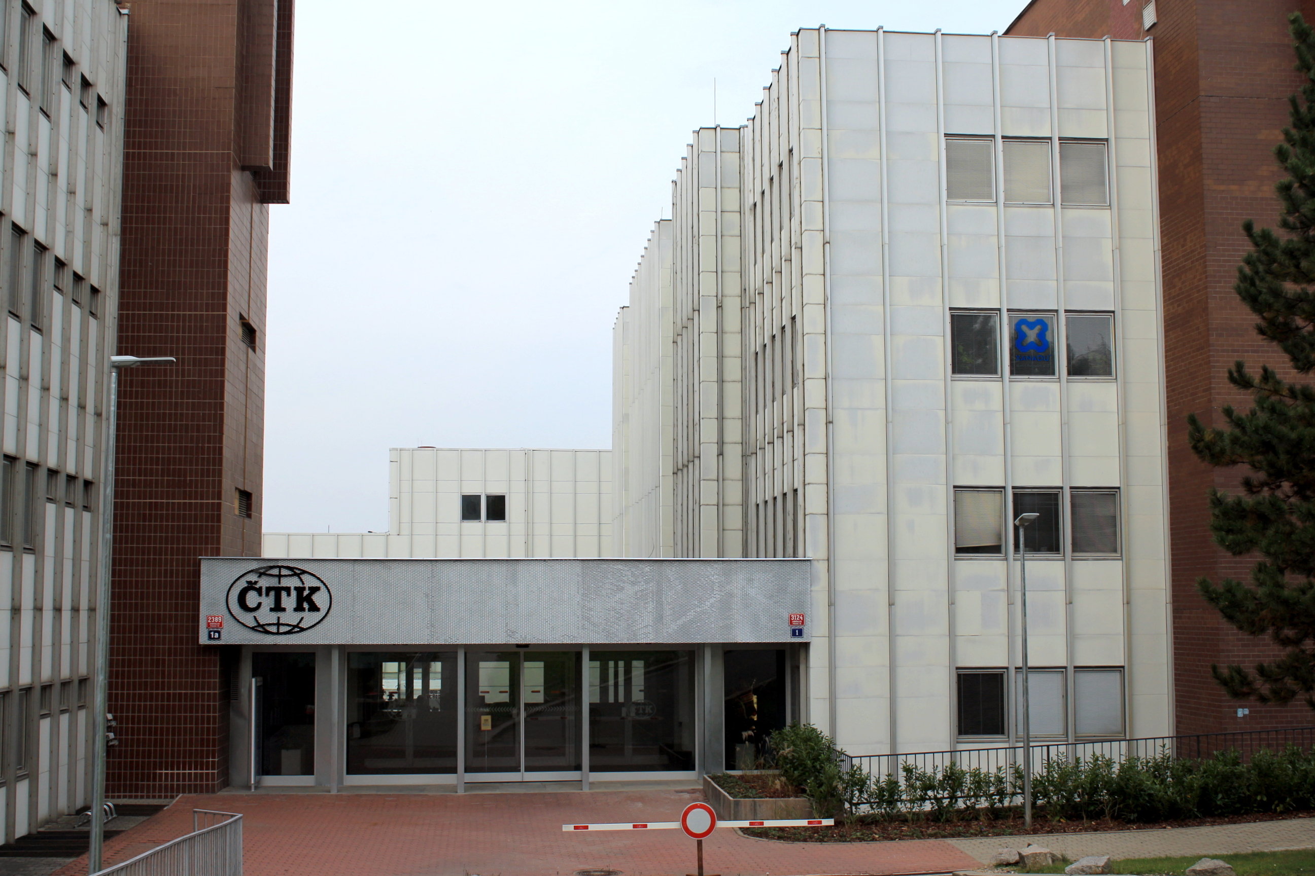 Budova ČTK, Žirovnická 3124/1, Praha-Záběhlice.